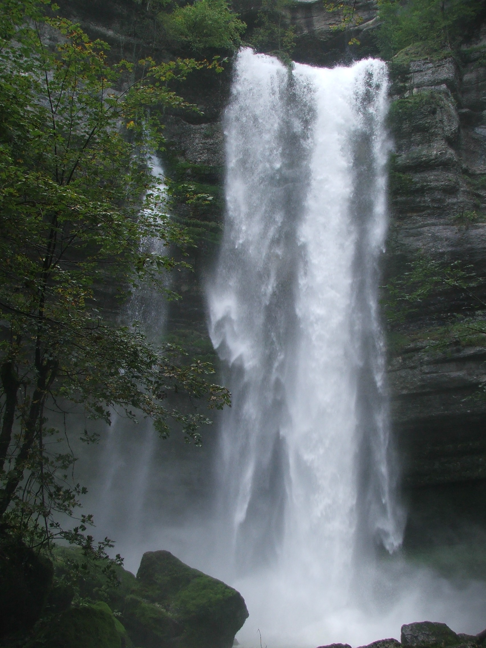 Grande Chute du Lançot dans le parc de Consolation (Doubs). Image prise par Knard25.